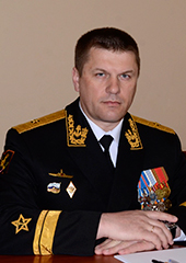 Контр-адмирал Виктор Николаевич Лиина